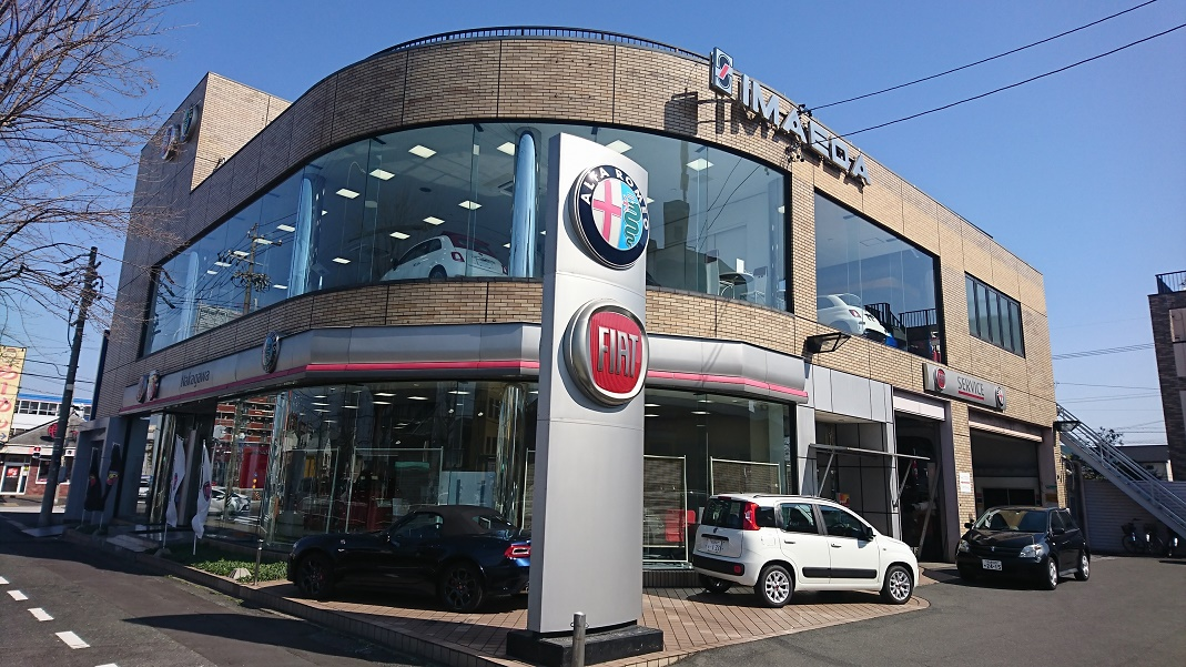 2019年、作者による撮影